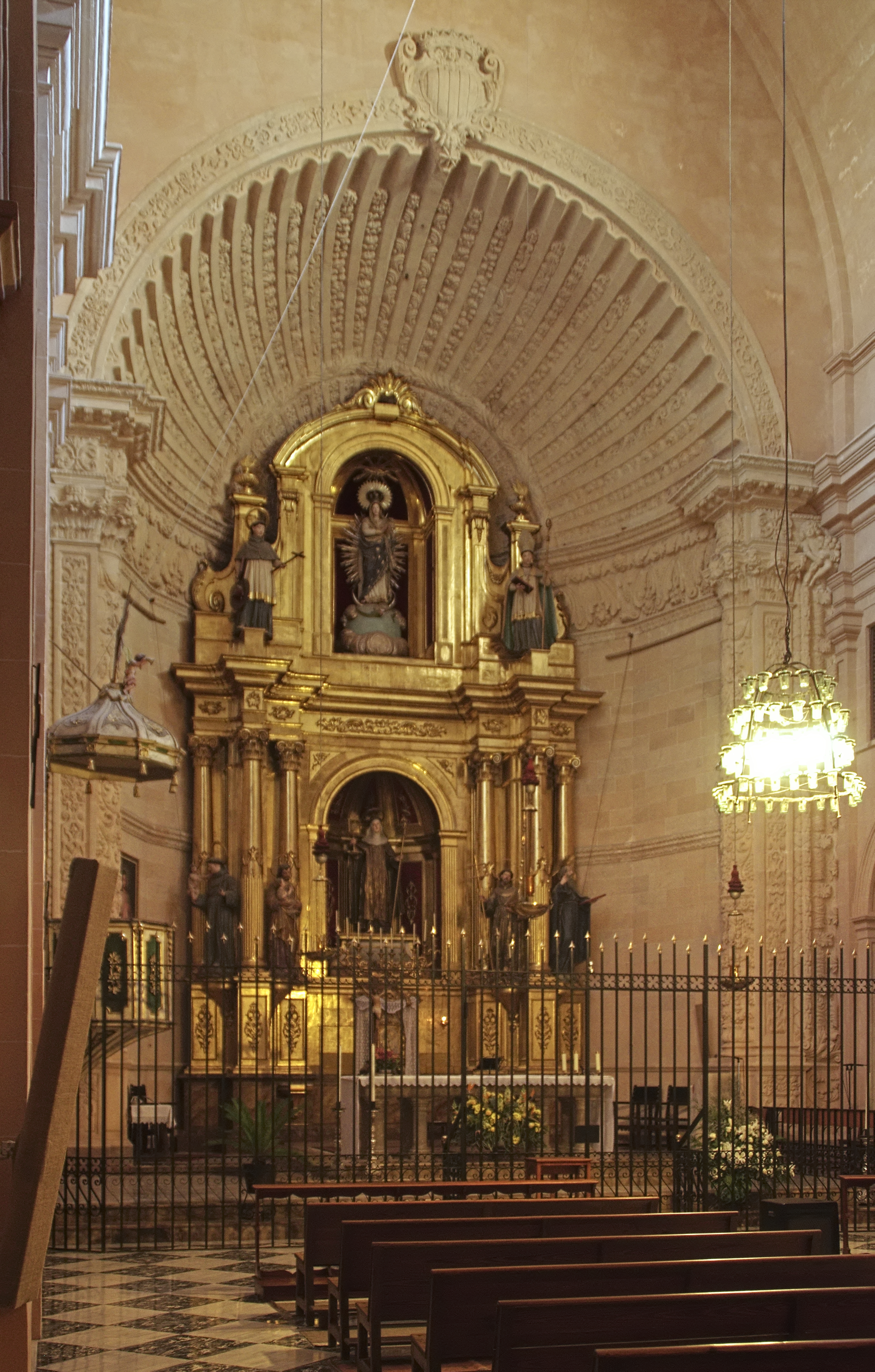 ołtarz główny kościoła św. Klary w Palmie, Majorka